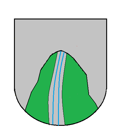 Escut municipal antic de Rialb (Pallars Sobirà)